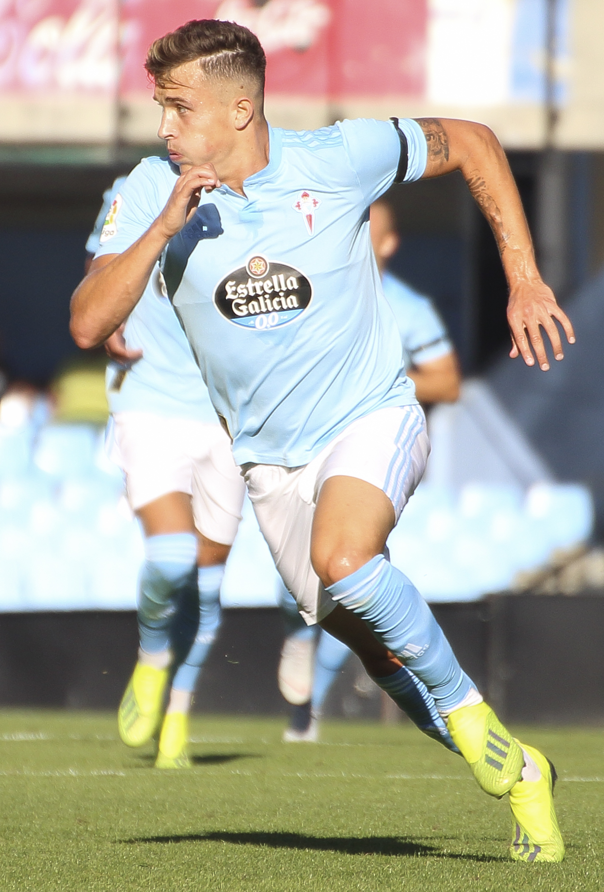 Partido disputado en los aledaños del Estadio de Balaidos, siendo el partido de presentación para el Celta ante su afición para la temporada 2018/2019